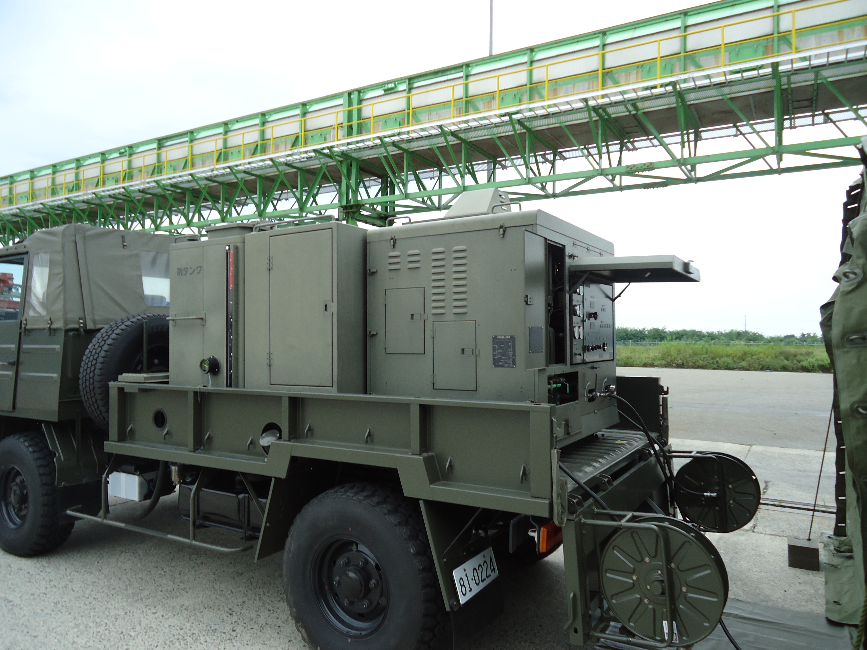 護衛艦ひゅうが一般公開で展示された第30普通科連隊の除染装置